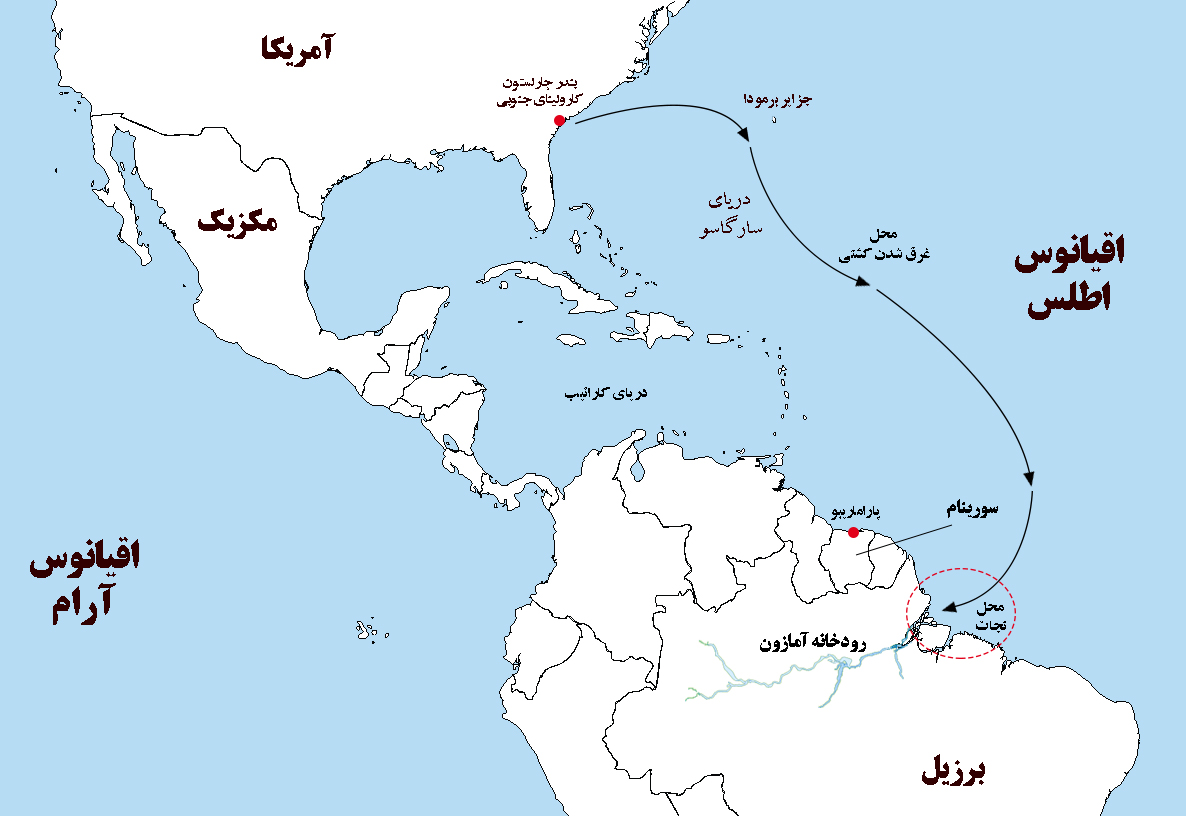 شرح رویدادهای اتفاق افتاده برای سرنشینان کشتی شانسلور